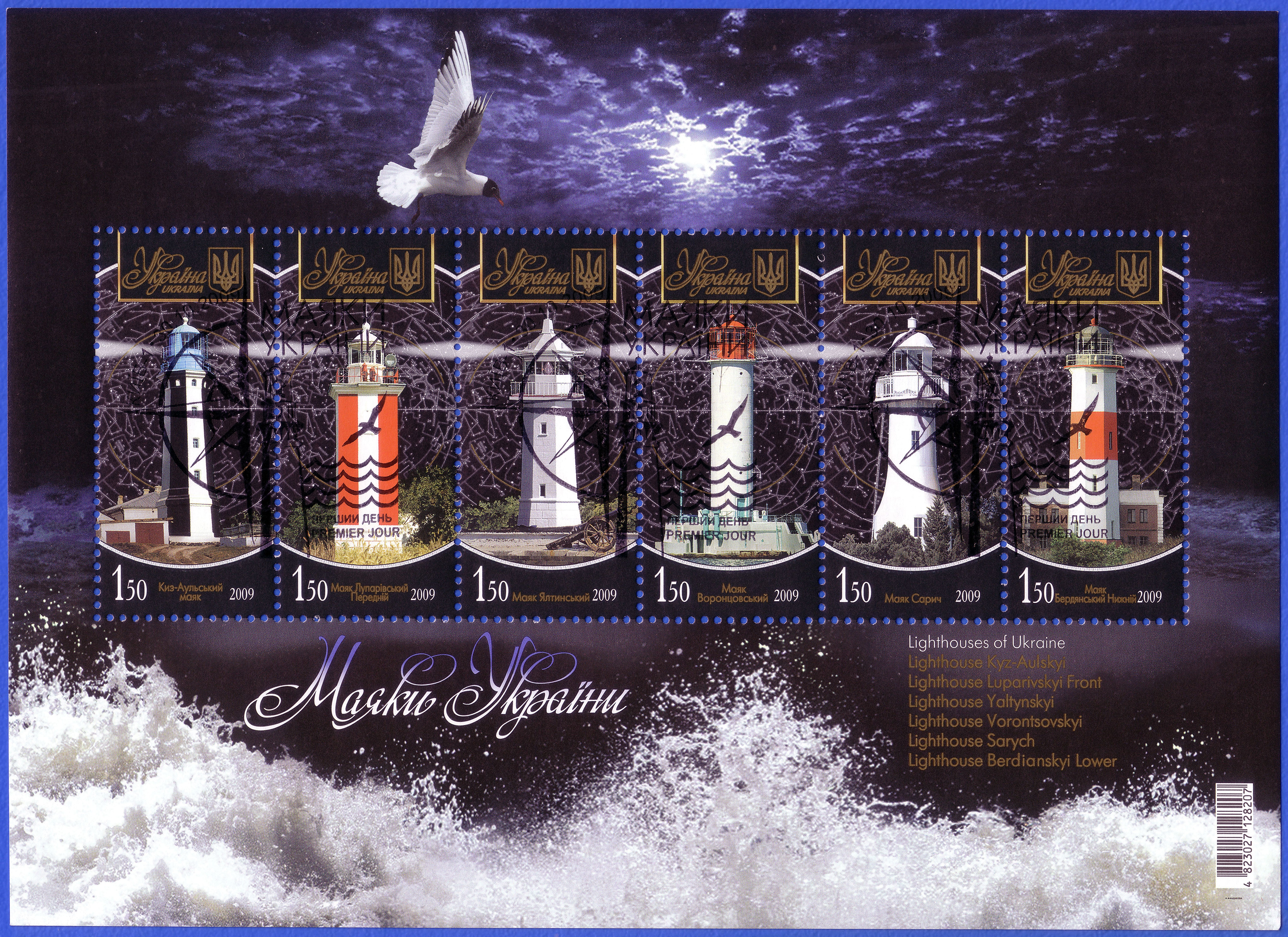 Маяки. Почтовый блок из 6 марок с гашением первого дня. Укрпочта, 2009.